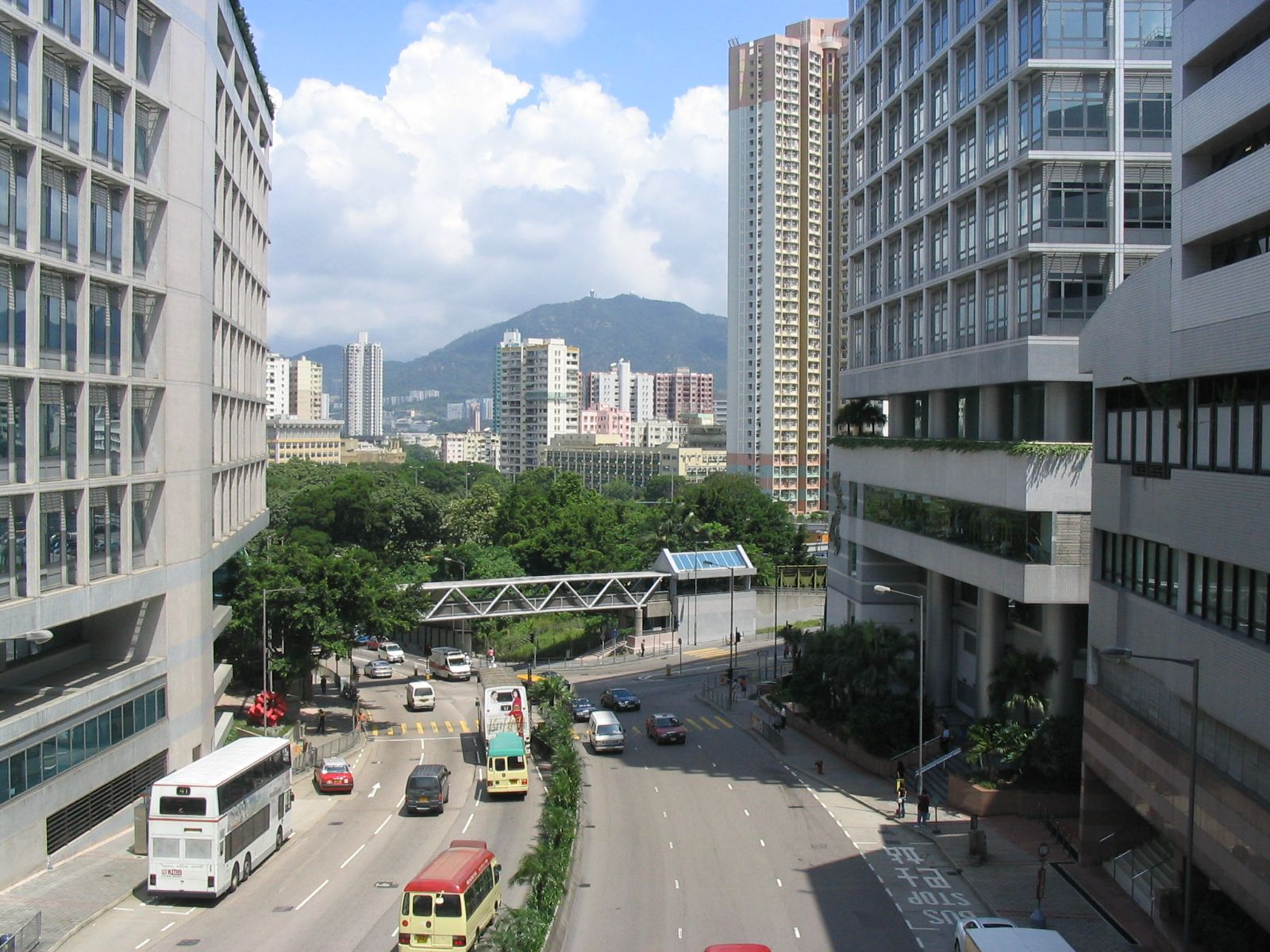 何文田-佛光街 Fat Kwong Street, Ho Man Tin